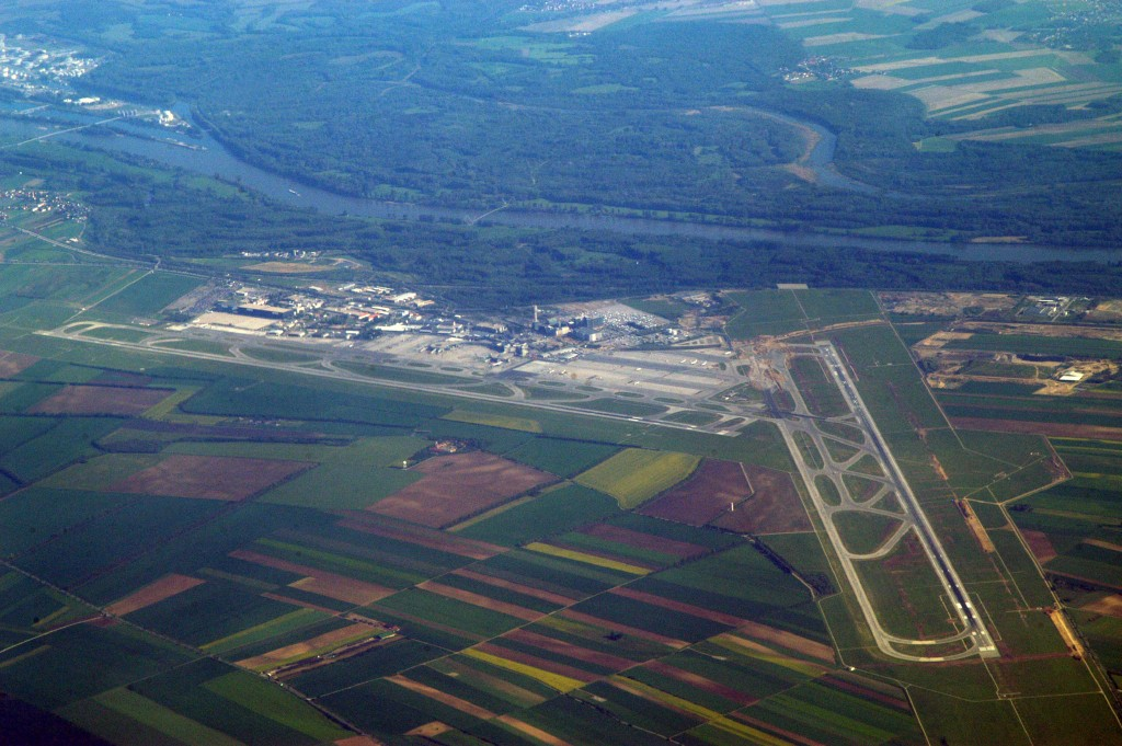 Flughafen Schwechat